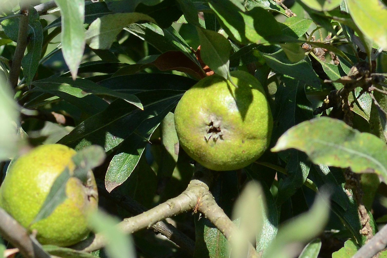 Pyrus salicifolia; Weidenblättrige Birne